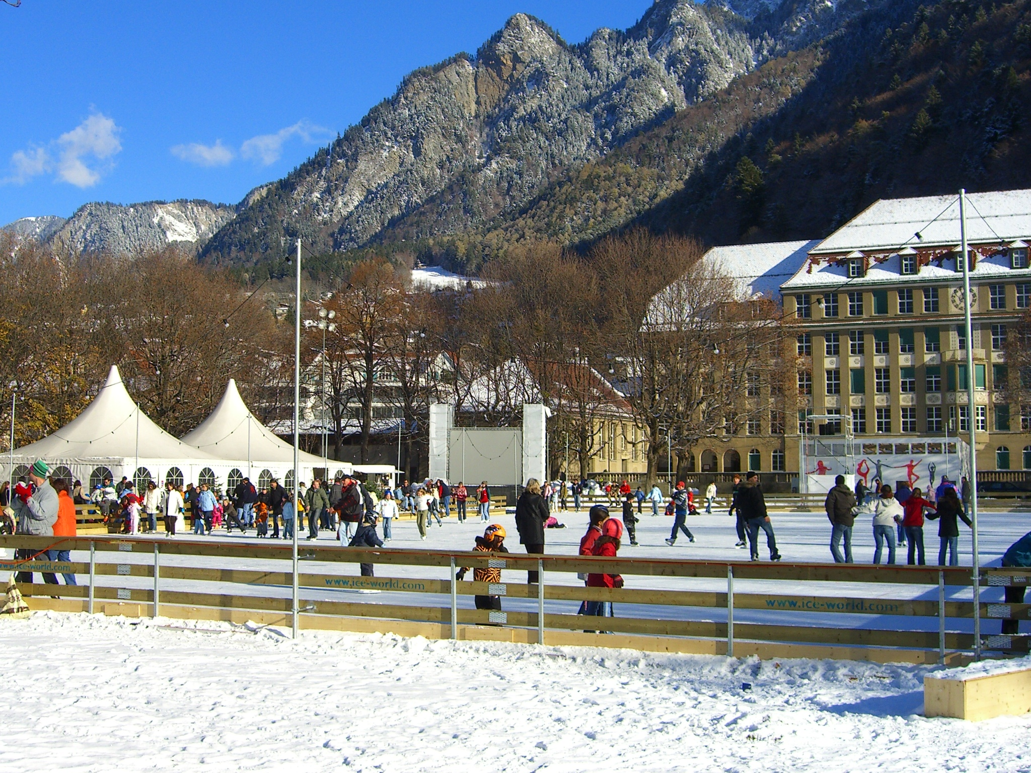 Chur, Eisfeld auf der Quaderwiese